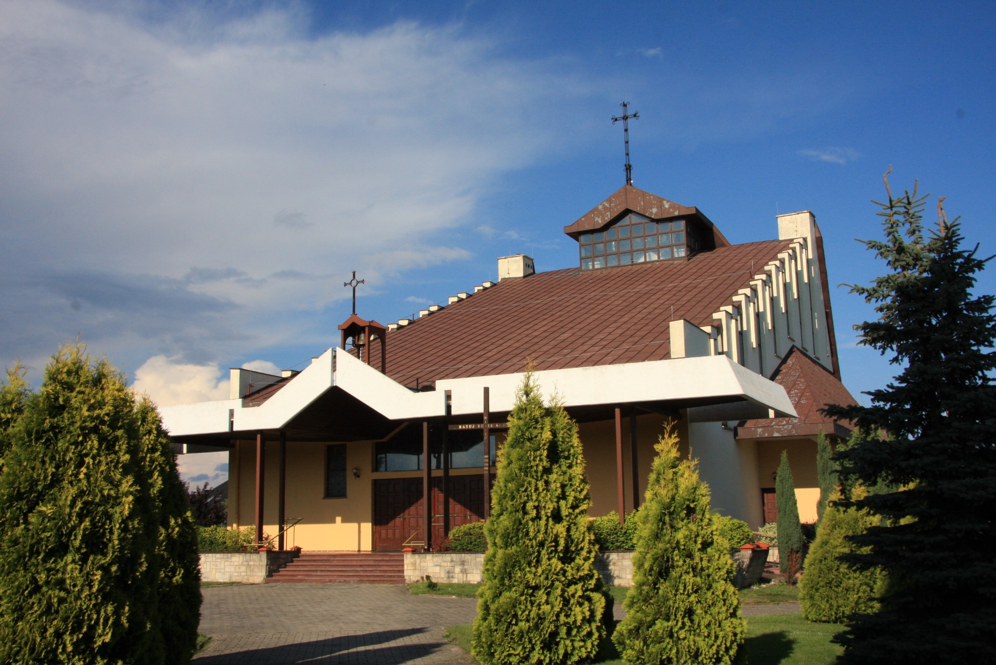 Kościół św. Anny Samotrzeciej w Opolu Chmielowicach do południowego zachodu